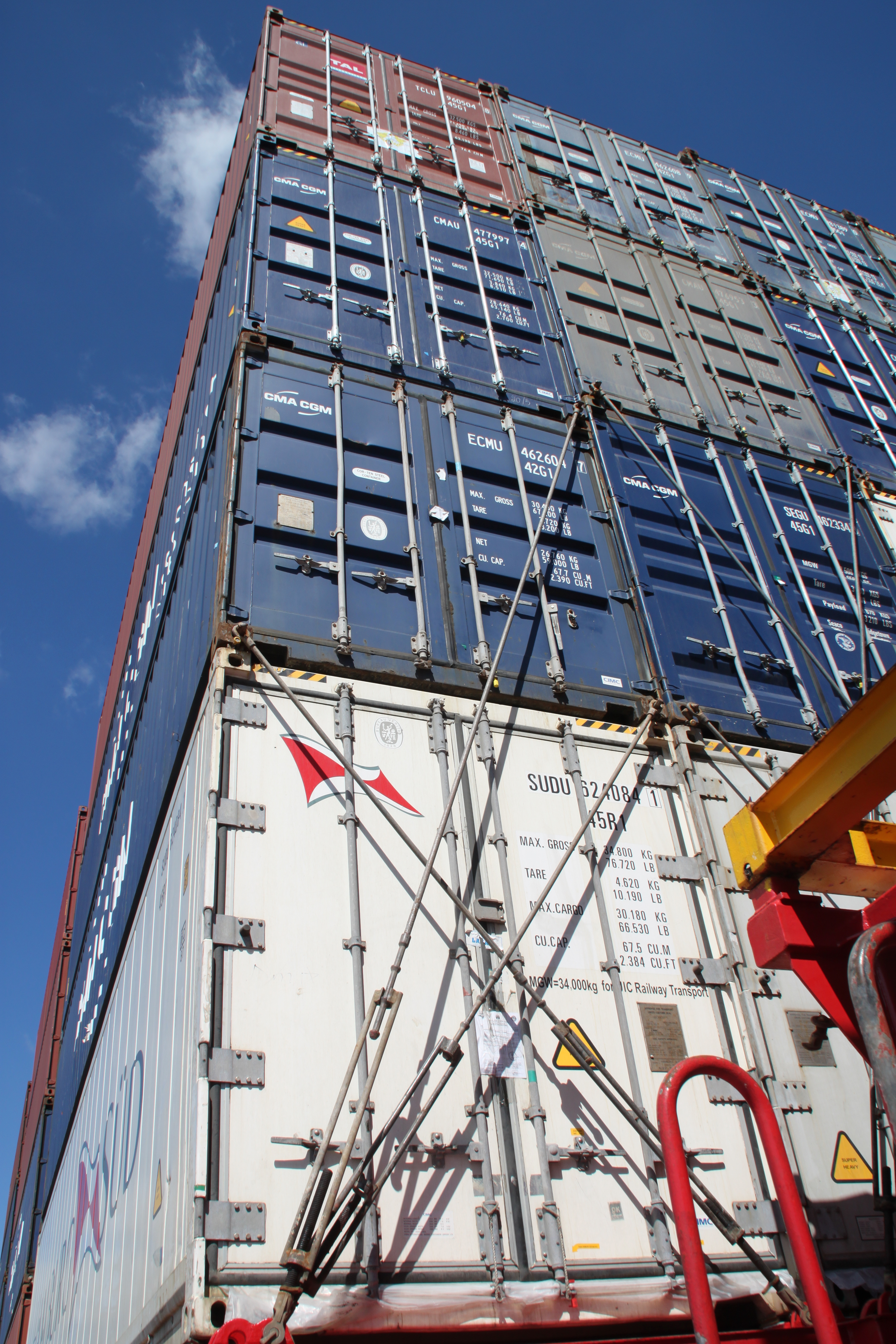 Container-hochgestapelt